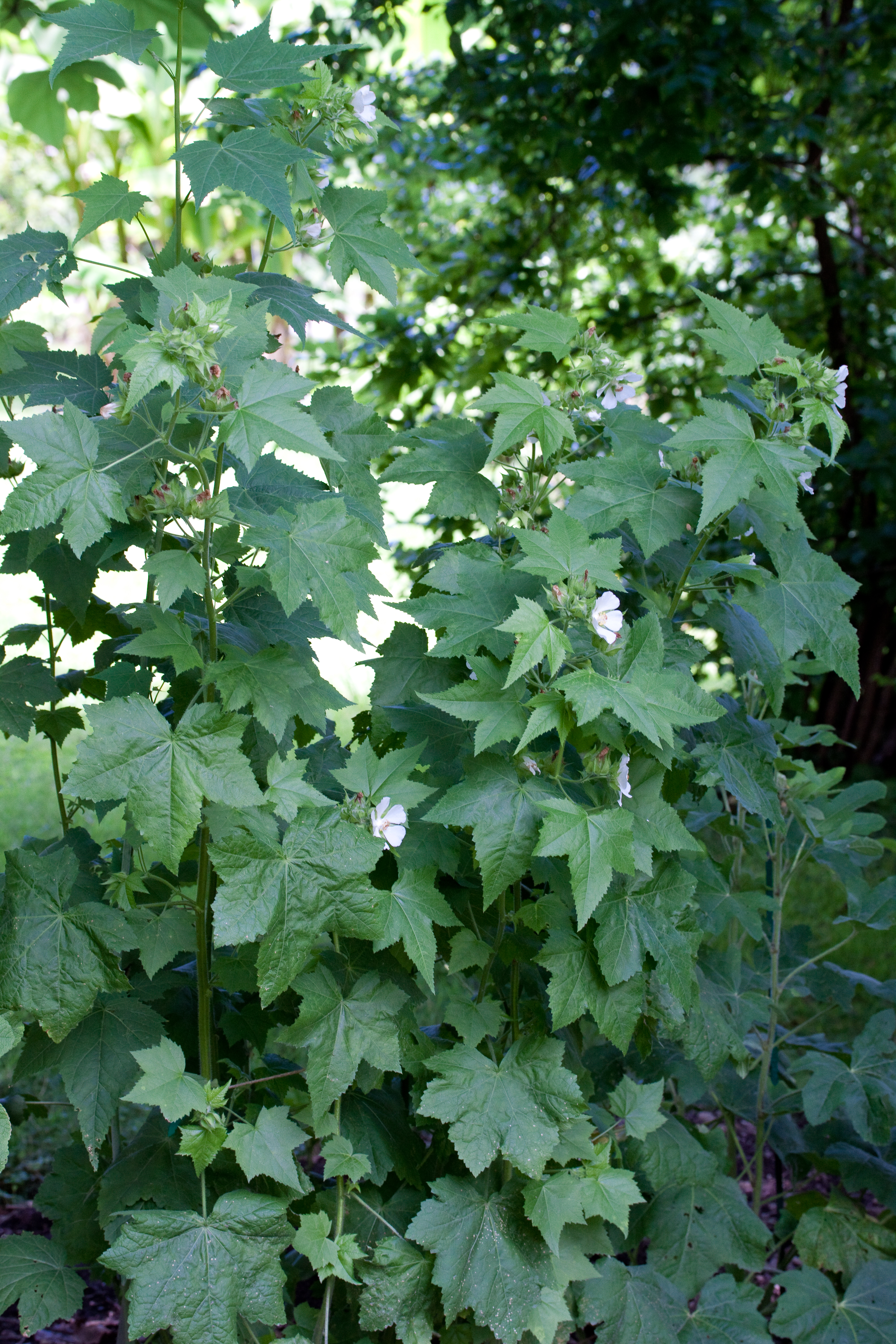 Floraison de Kitaibela vitifolia - Jardin botanique de Strasbourg - France